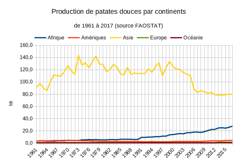 Évolution de la production de patates douces (Ipomoea batatas) par continents de 1961 à 2017 - Source = FAOSTAT